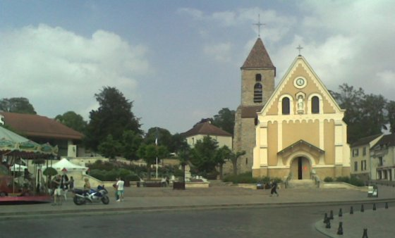 Eglise Saint-Honest de Yerres, Essonne, France